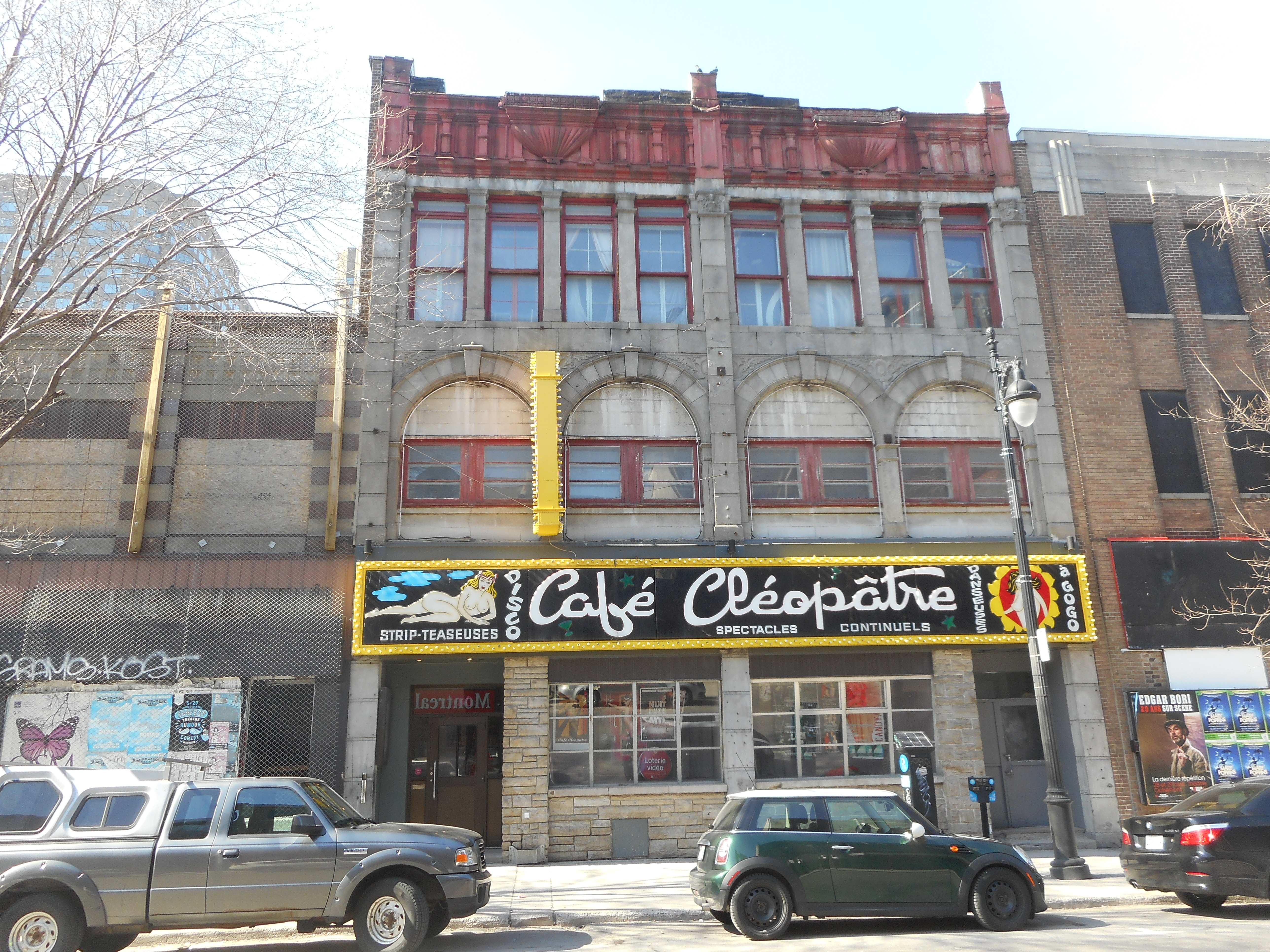 Boulevard Saint-Laurent, côté ouest, au sud de la rue Sainte-Catherine